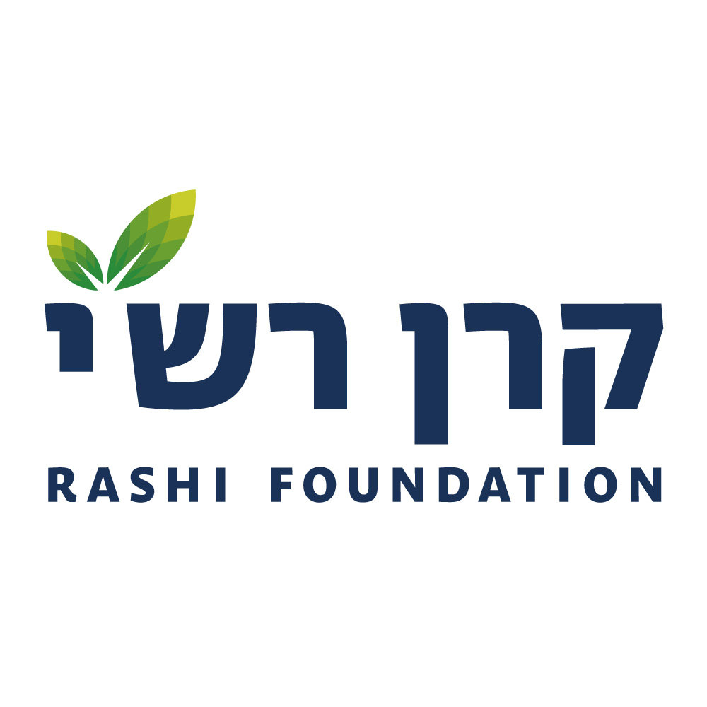 Rashi Foundation logo 2020